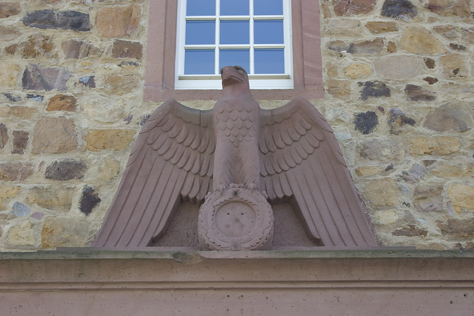 Adler von 1937 über dem Nordportal des westlichen Flügels des Butzbacher Schlosses